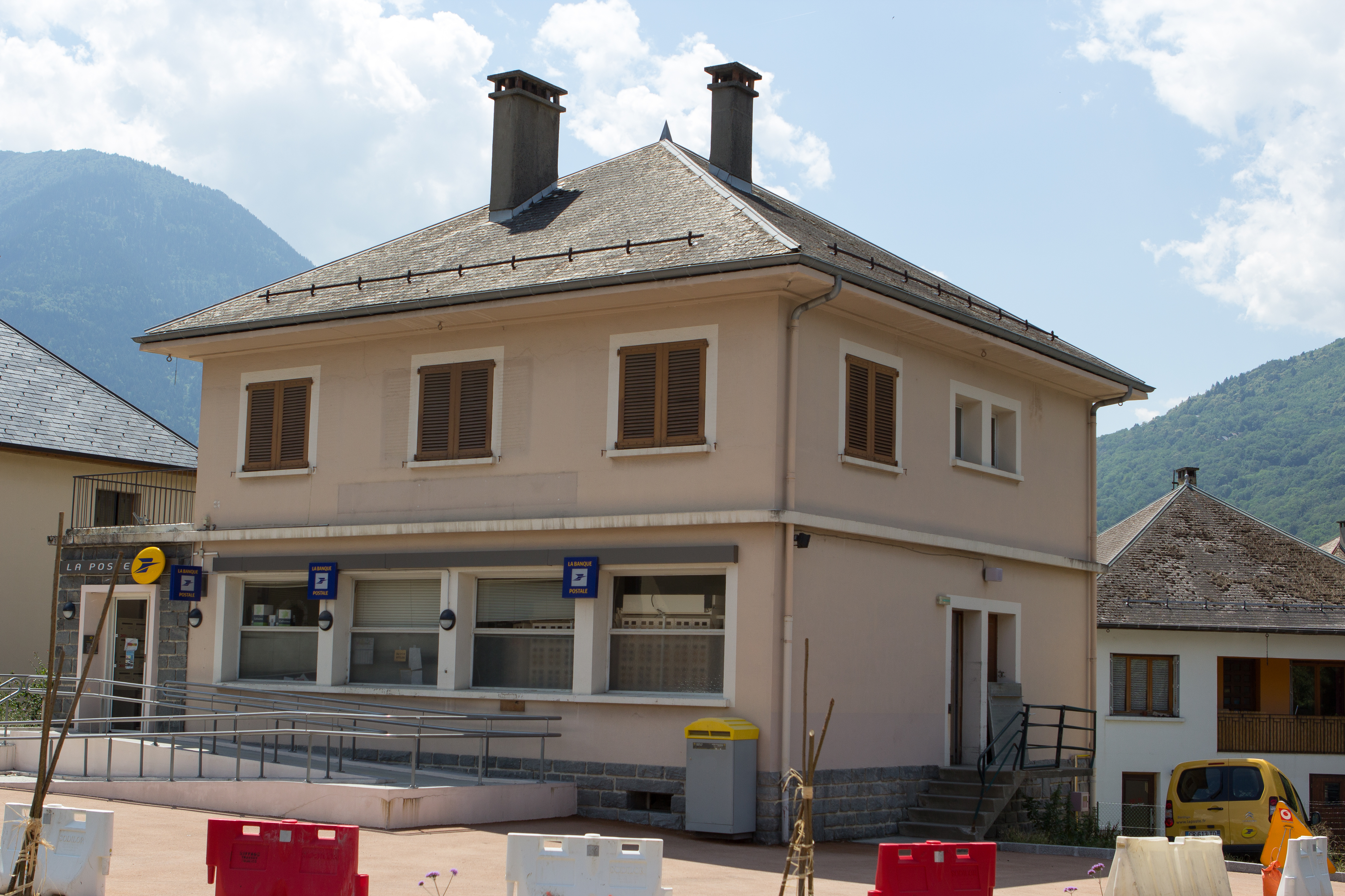 Vue de La Chambre / La Chambre / Savoie / France